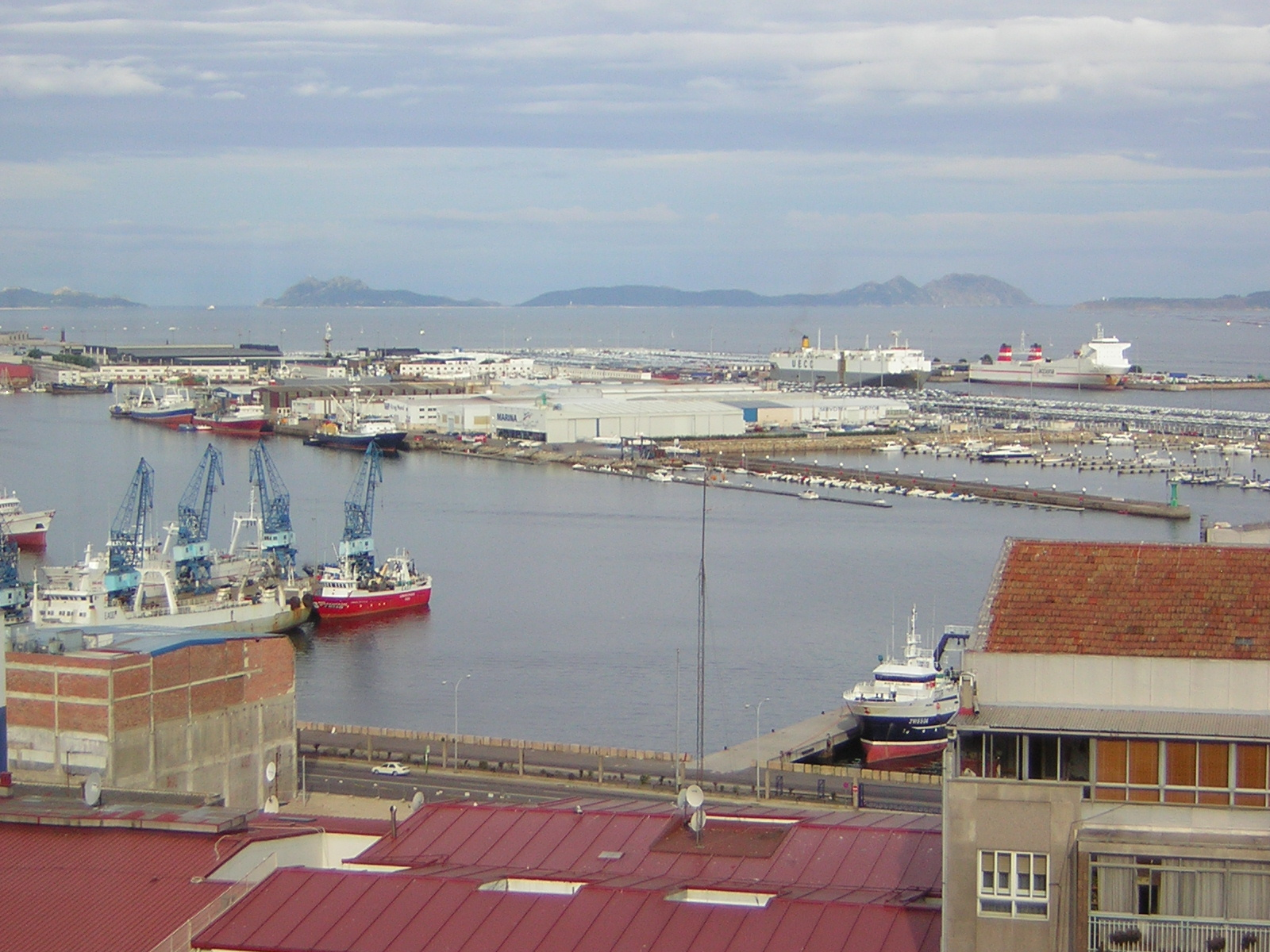 Vista de la Ría de Vigo con las islas Cíes al fondo. Vigo, Pontevedra (España).